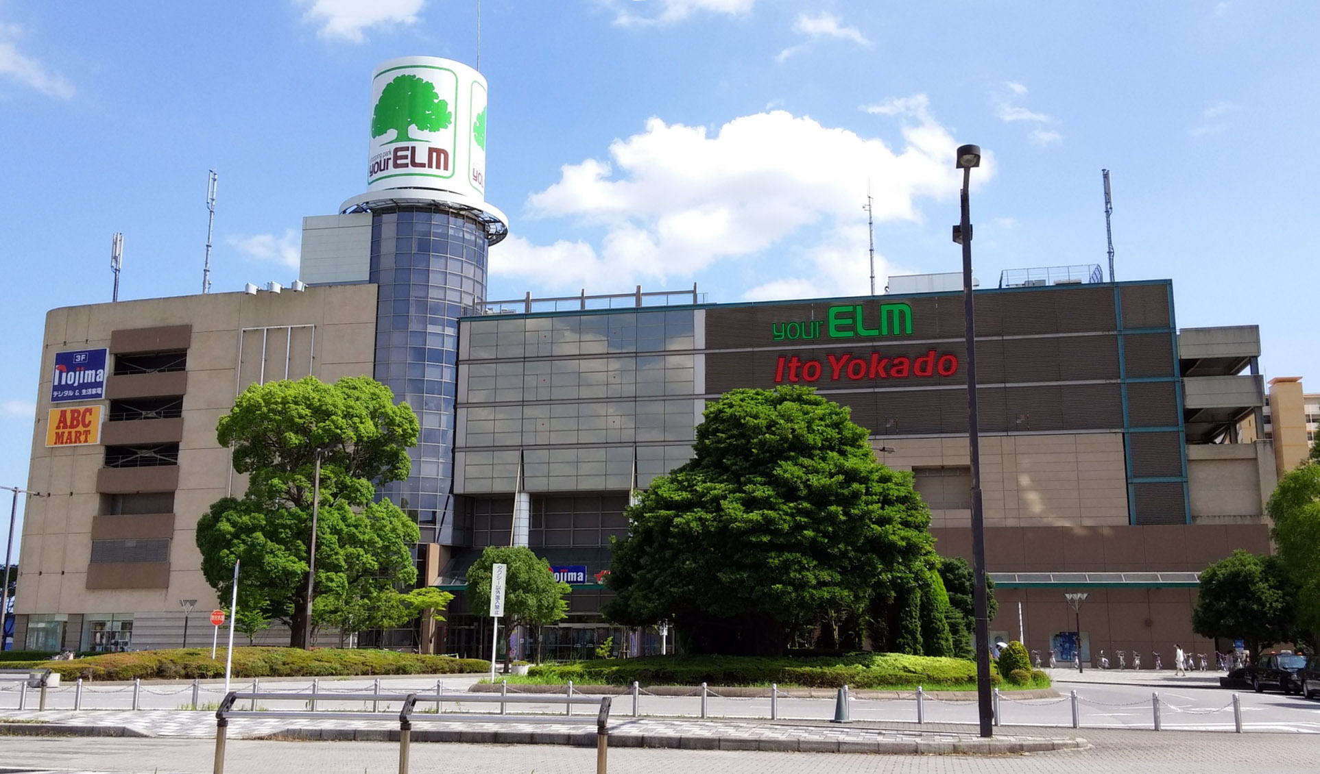 公津の杜駅バス停より撮影